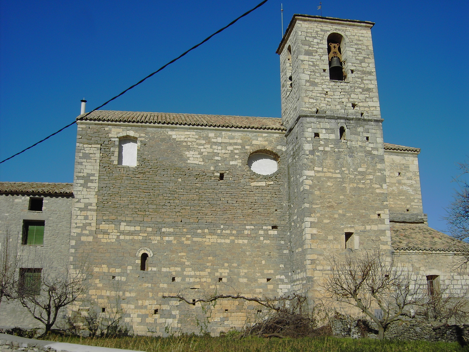 La Iglesia de Lecina, consagrada a San Juan Bautista, se levanta en el lugar exacto donde existió un monasterio de origen visigótico.